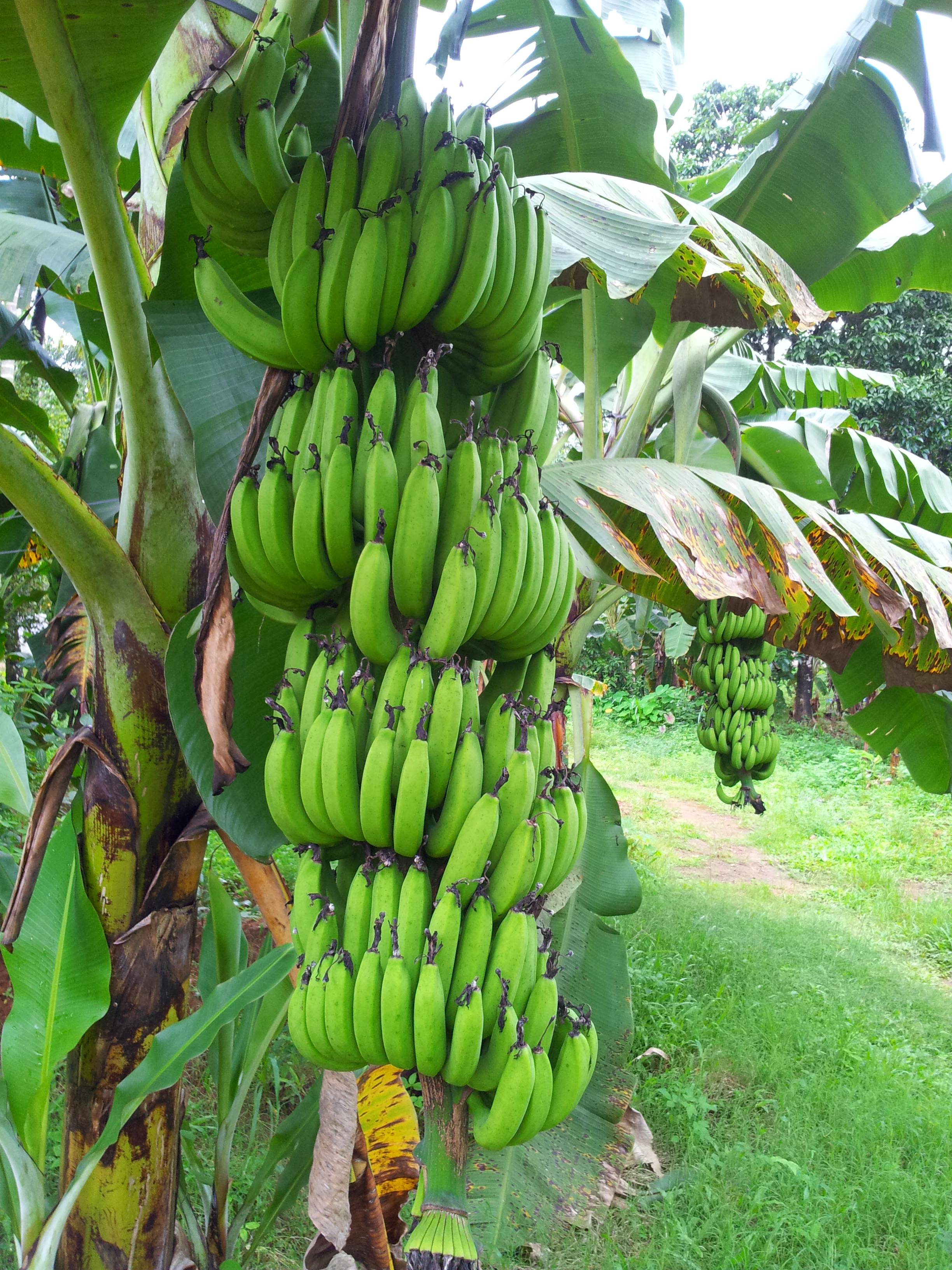 Banana tree from Valiyaparambu, Kerala